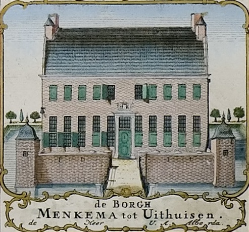 Borg Menkema in Uithuizen. Uitsnede uit de kaart van Theodorus Beckeringh uit 1781